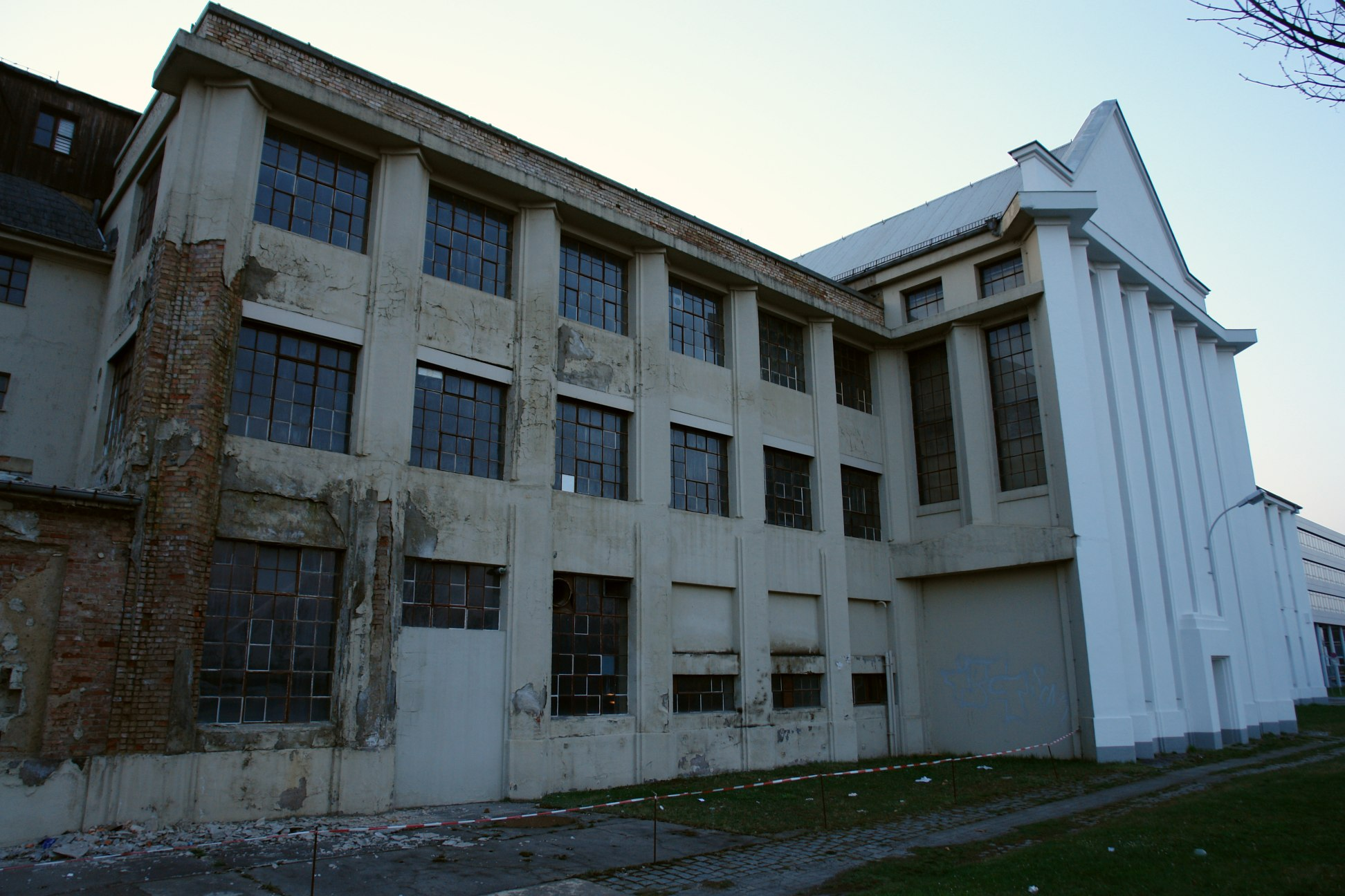 Fabrikanlage der ehemaligen Firma Koch & Sterzel in Dresden-Übigau, Washingtonstraße; rechts die „Tempelfront“ der Fabrikhalle, links der dreigeschossige Trakt